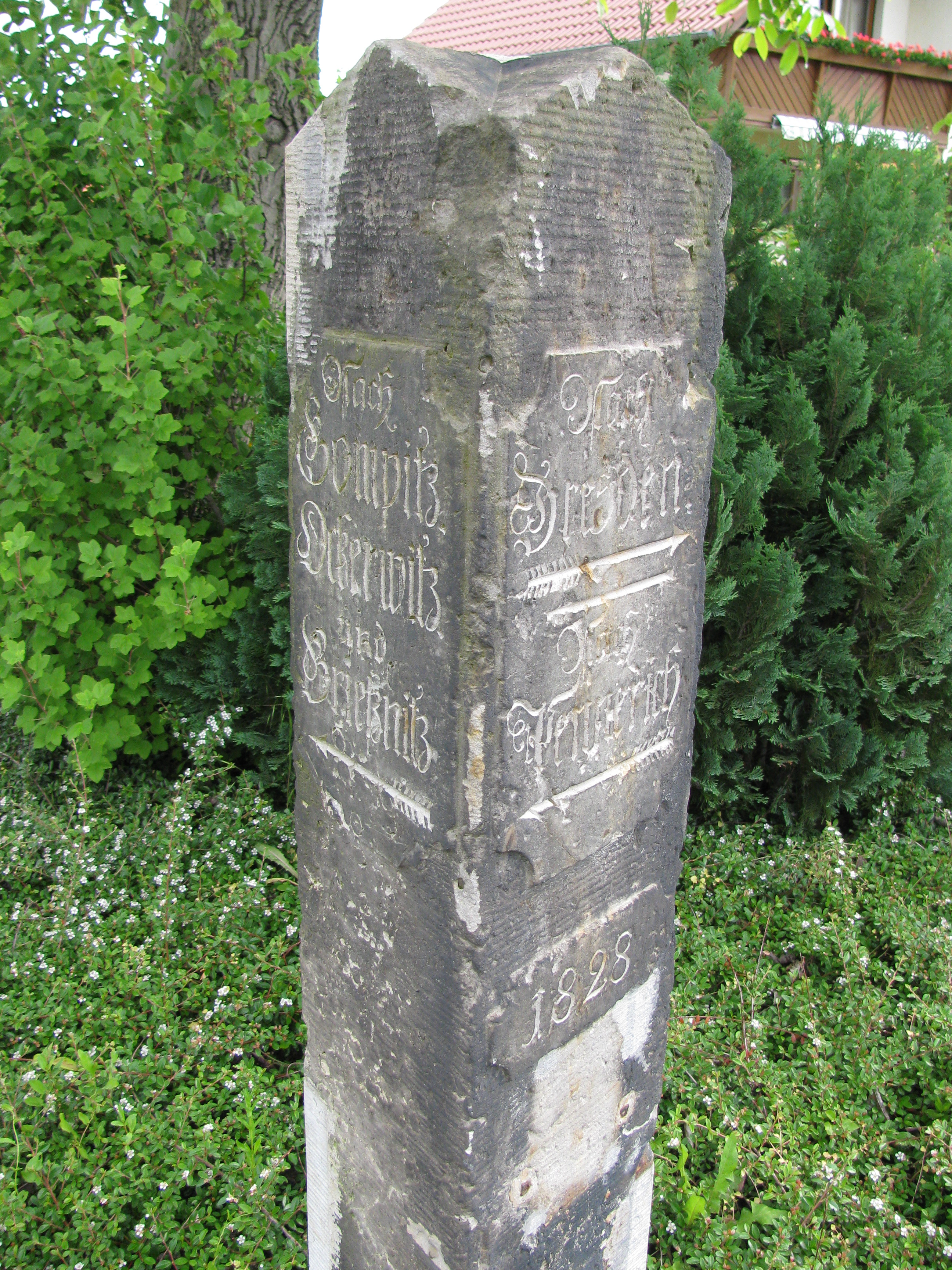 Wegweiser aus dem jahre 1828 an der Altnossener Straße/Ecke Hohlweg, Gemarkung Gompitz, Ortsteil von Dresden. Geradeaus geht's nach Gompitz (in den Dorfkern), Ockerwitz und Brießnitz (Briesnitz, damaliges Kirchdorf), rechts nach Dresden (damalige Residenzstadt) und links nach Pennerich (Pennrich).